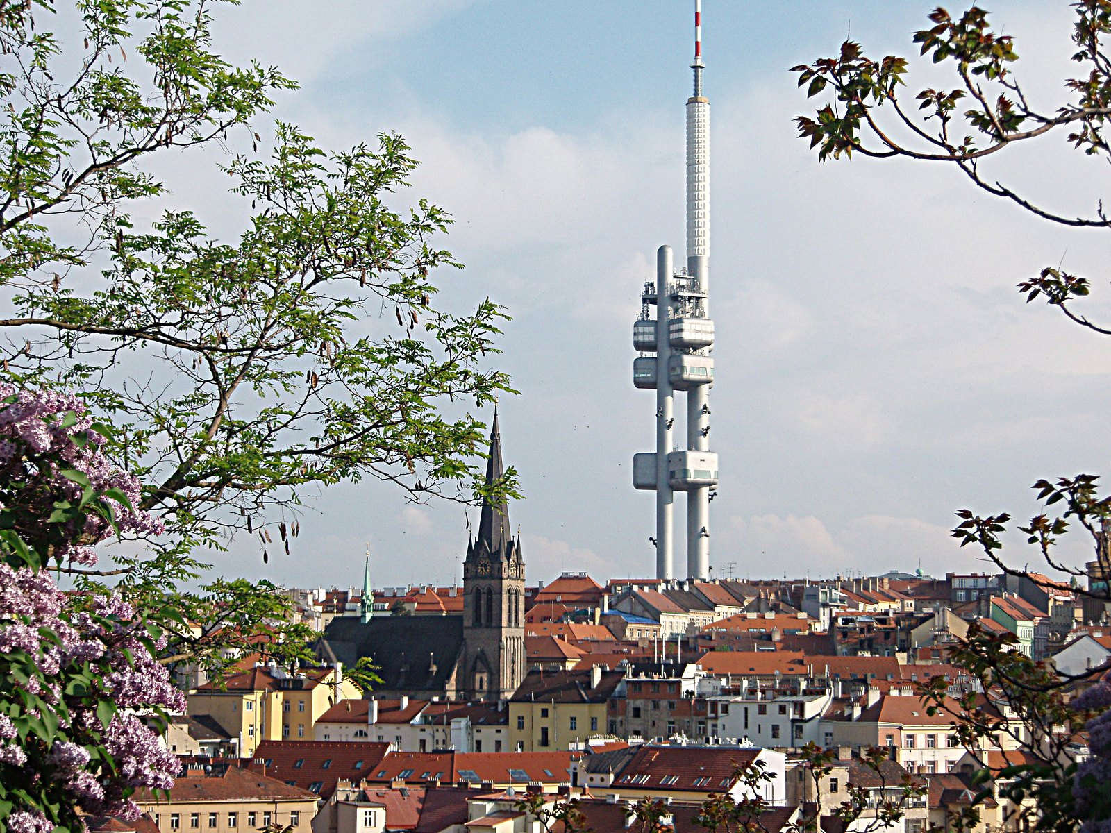 Panorama of Prague